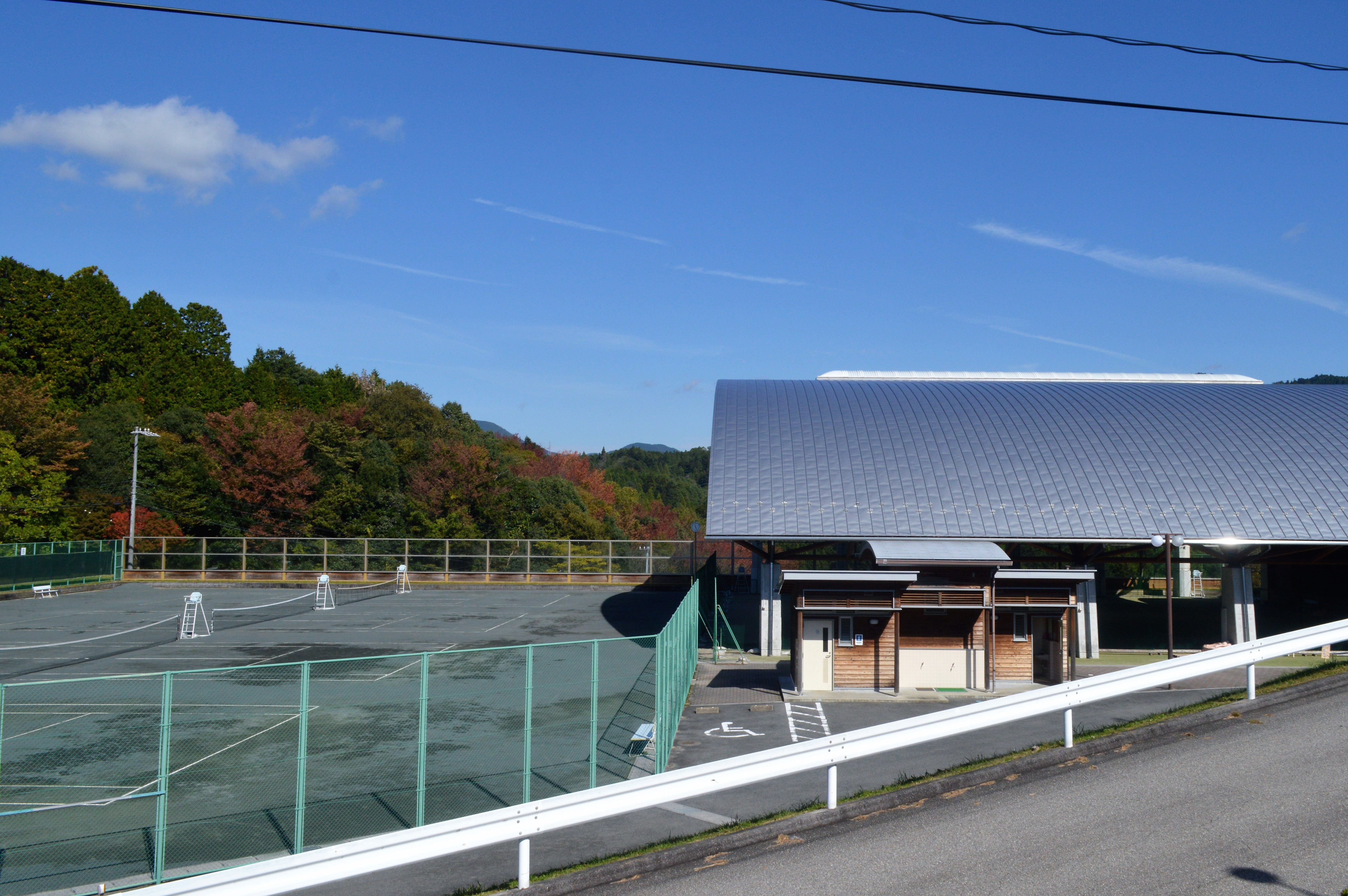 愛知県北設楽郡設楽町田口にある設楽町ふれあい広場。屋内コートと屋外テニスコート。